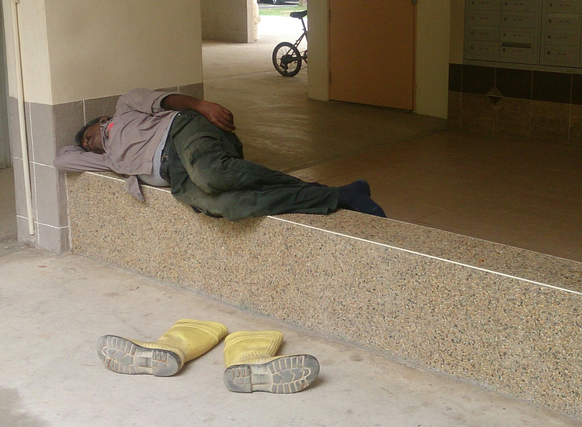 lunch time nap